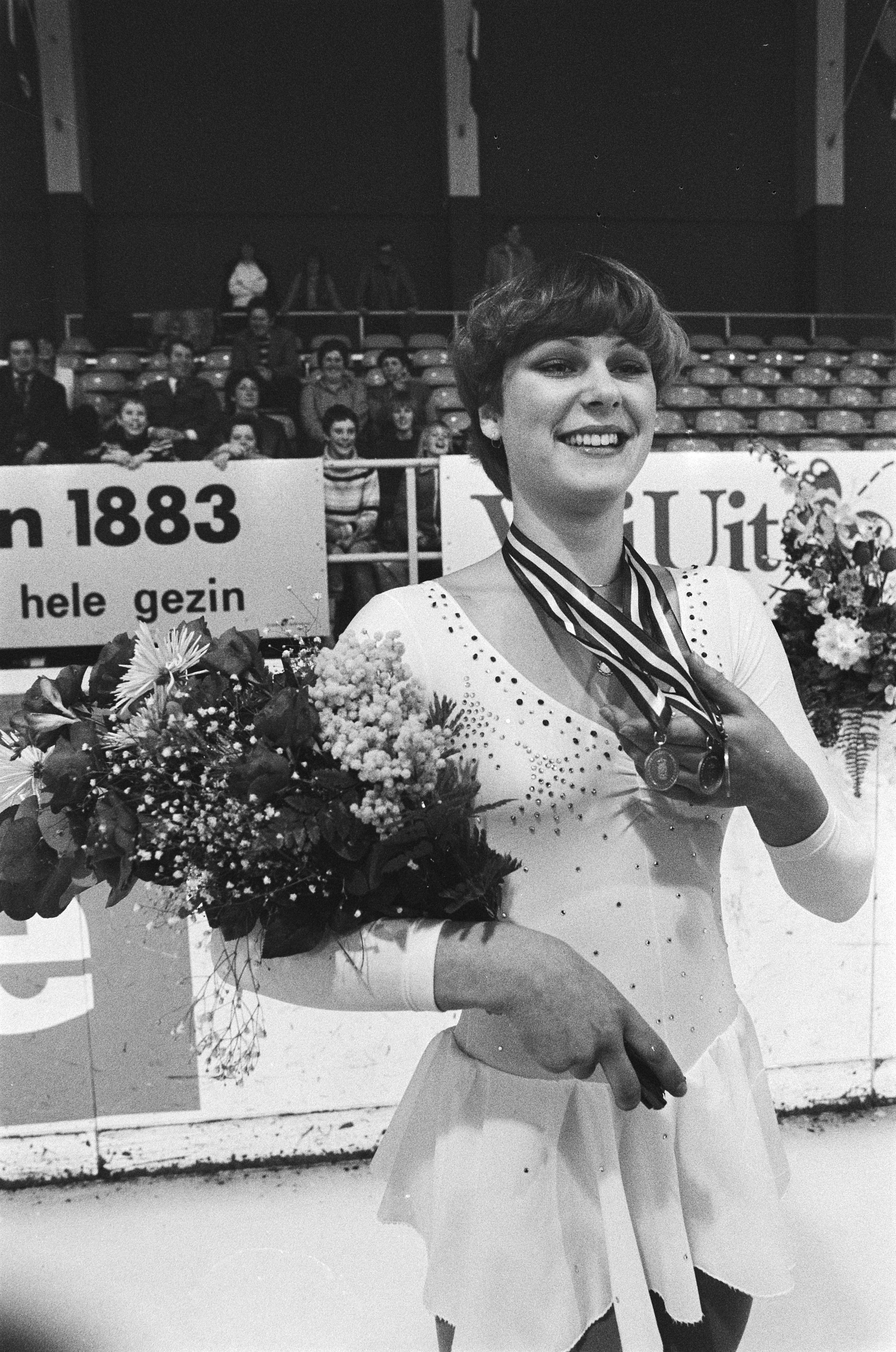 Collectie / Archief : Fotocollectie Anefo Reportage / Serie : [ onbekend ] Beschrijving : Nederlandse kampioenschappen kunstrijden op de schaats; Astrid Jansen toont medailles Datum : 13 januari 1979 Trefwoorden : KAMPIOENSCHAPPEN, MEDAILLES, kunstrijden Persoonsnaam : Astrid Jansen Fotograaf : Dijk, Hans van / Anefo Auteursrechthebbende : Nationaal Archief Materiaalsoort : Negatief (zwart/wit) Nummer archiefinventaris : bekijk toegang 2.24.01.05 Bestanddeelnummer : 930-0749